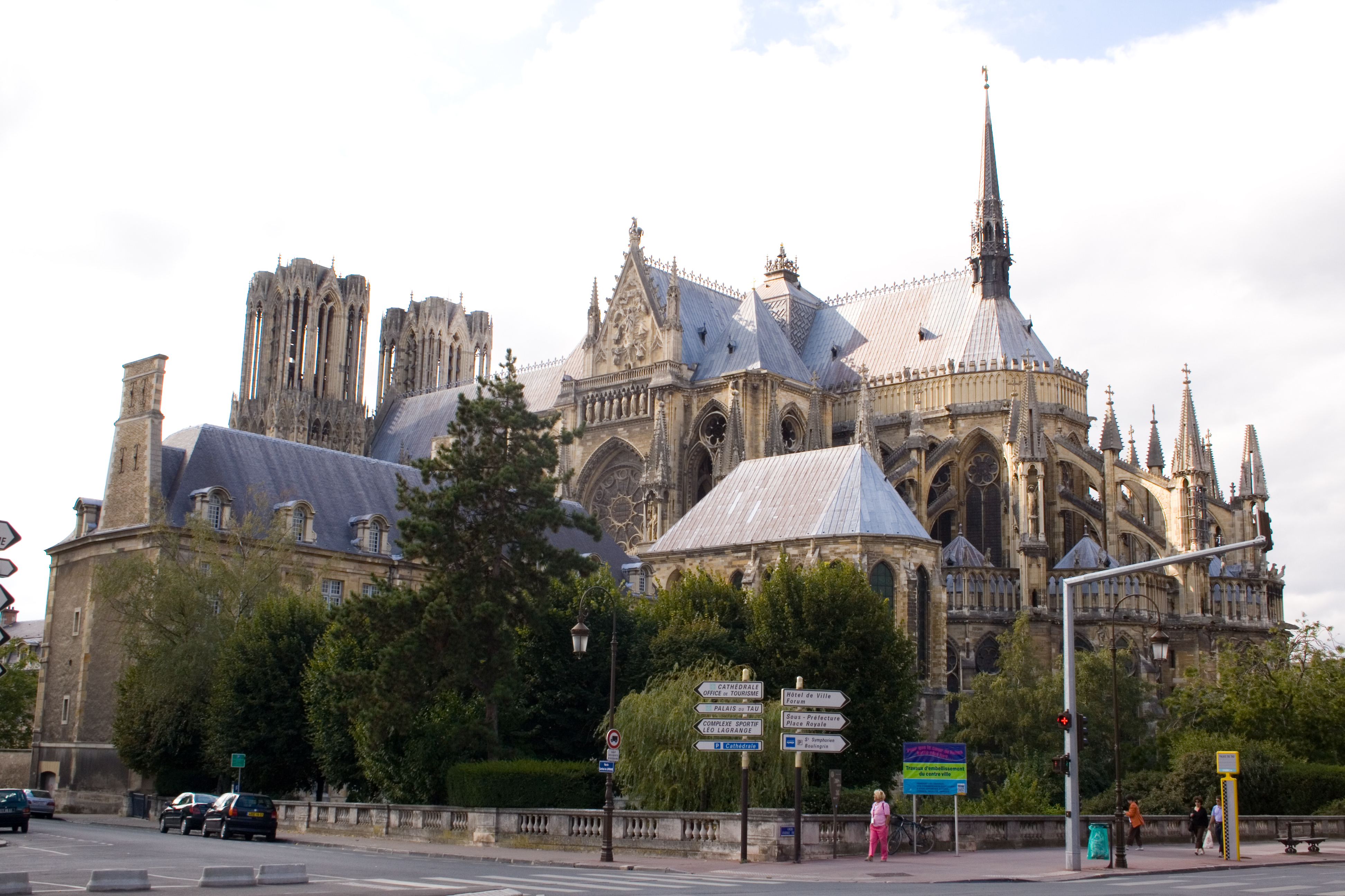 Cathédrale de Reims